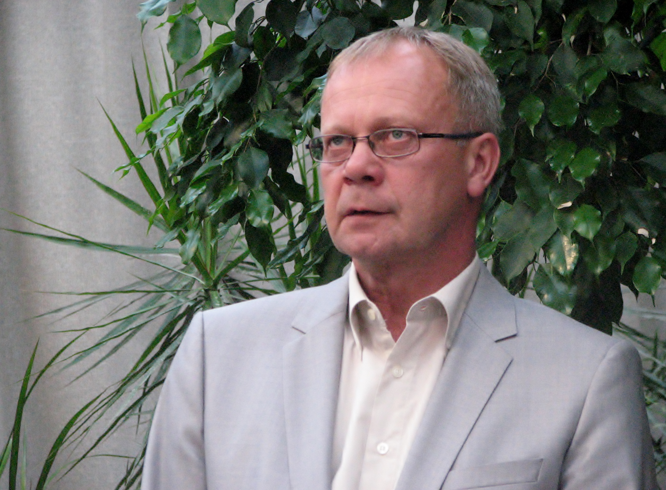 Priit Maide Estonia maja juubelipidustuste raames autogrammitunnis